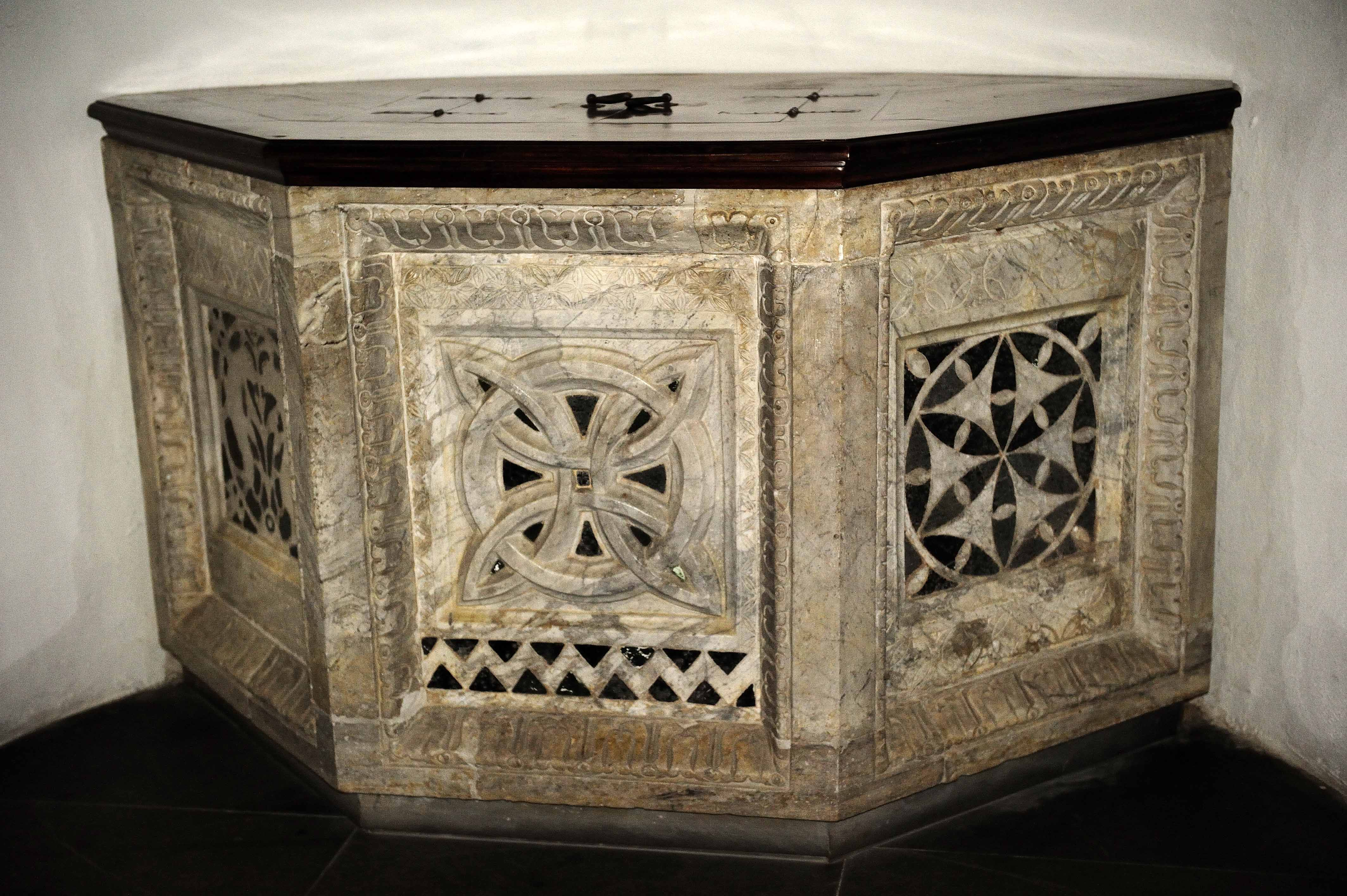 Fonte Battesimale del XI secolo, oggi nella chiesa di Sant'Andrea a Montespertoli ma proveniente dalla Pieve di Coeli Aula - Montespertoli - Firenze